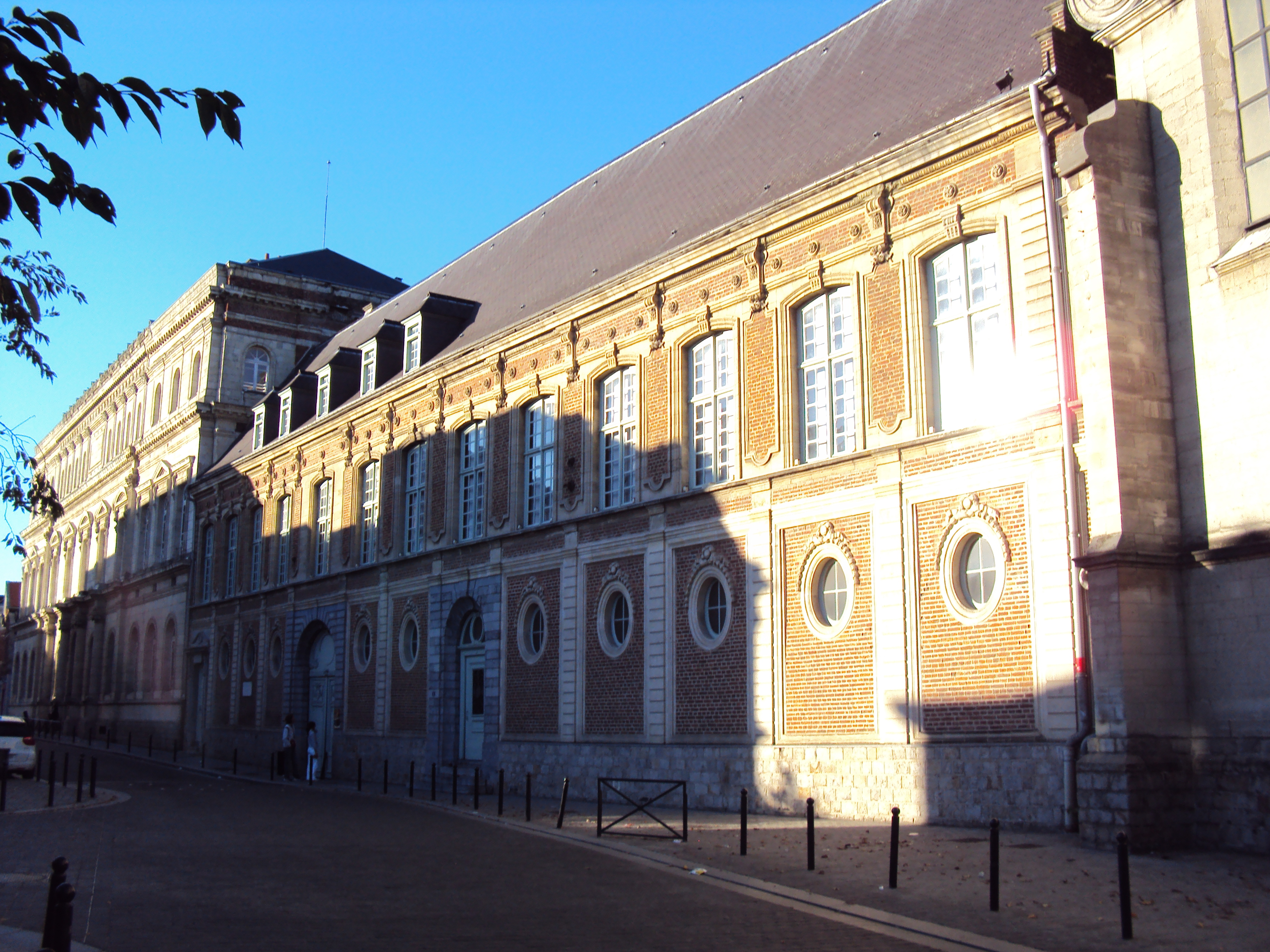 Collège des Jésuites à Valenciennes (Nord)